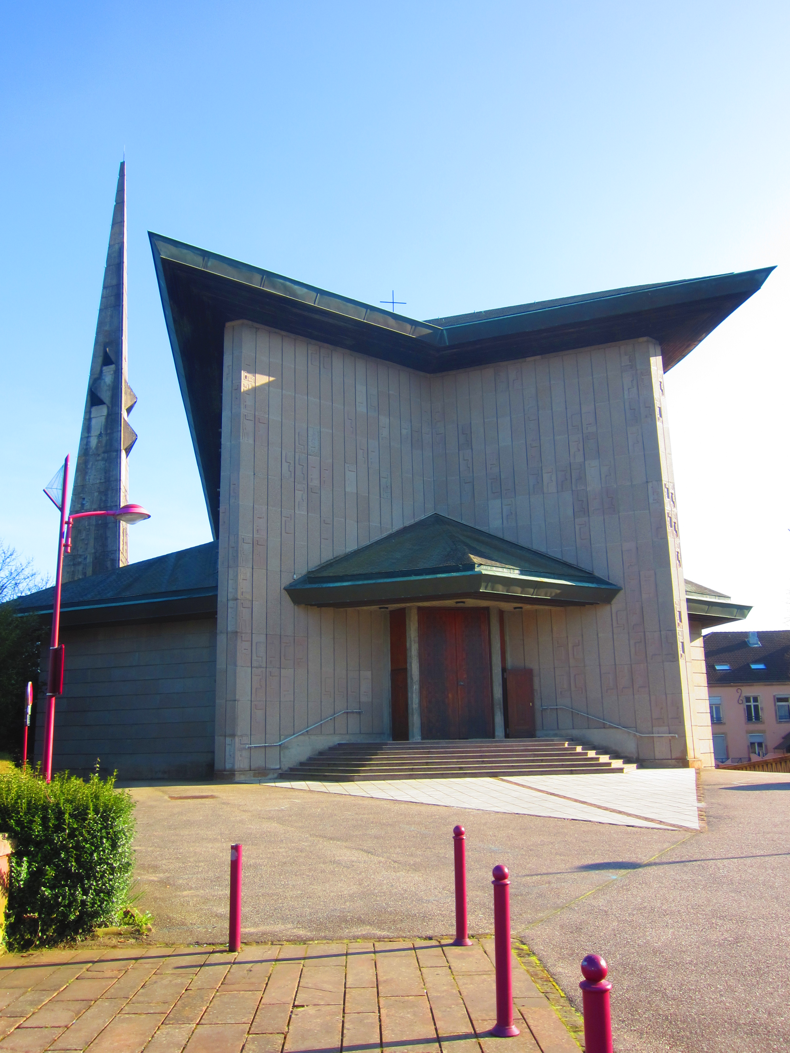 Baccarat eglise